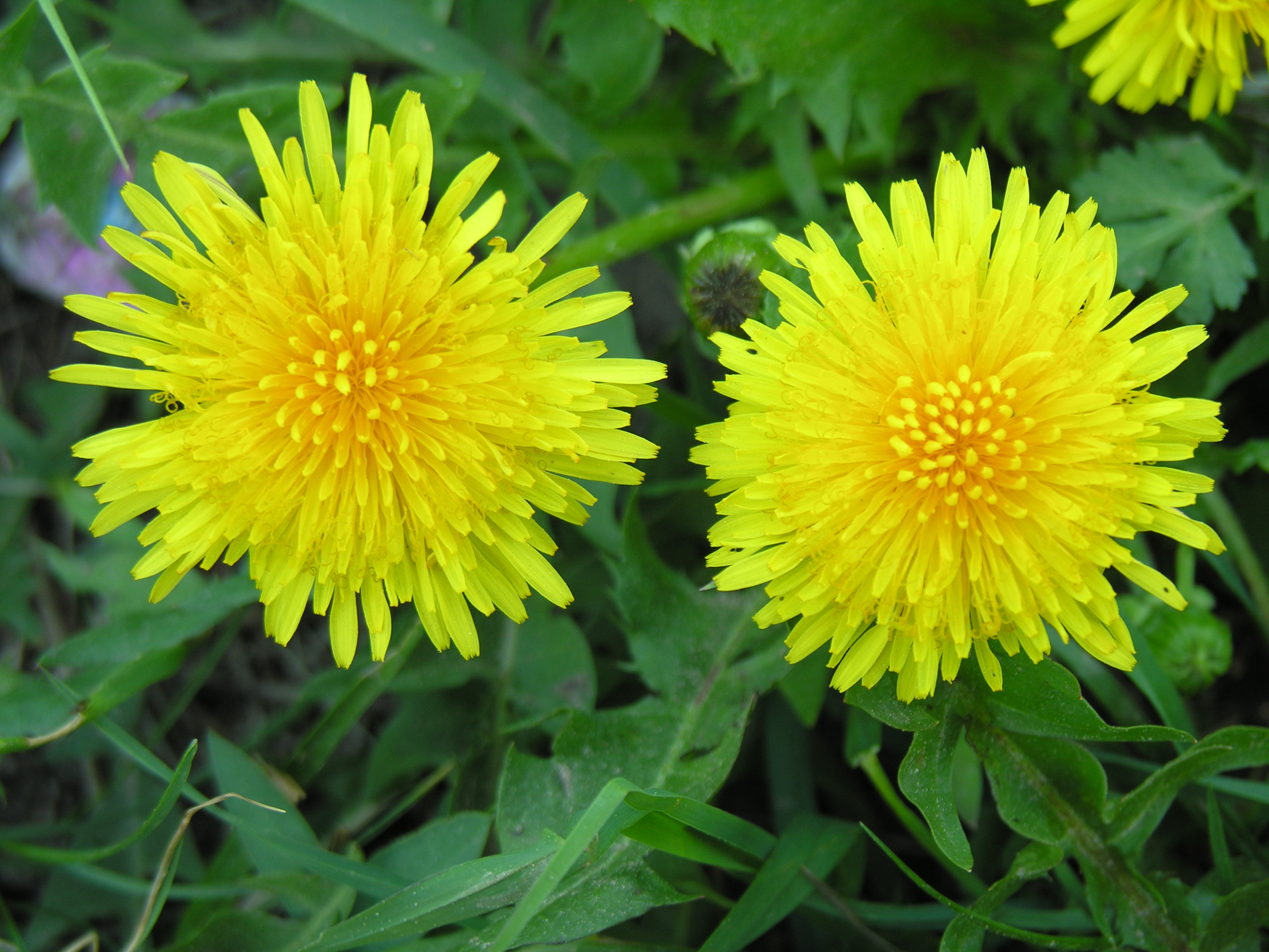 Paprastosios kiaulpienės (Taraxacum officinale) žiedai Šeima. Astriniai (Asteraceae) Foto: Algirdas, 2006 m. gegužės 13 d.